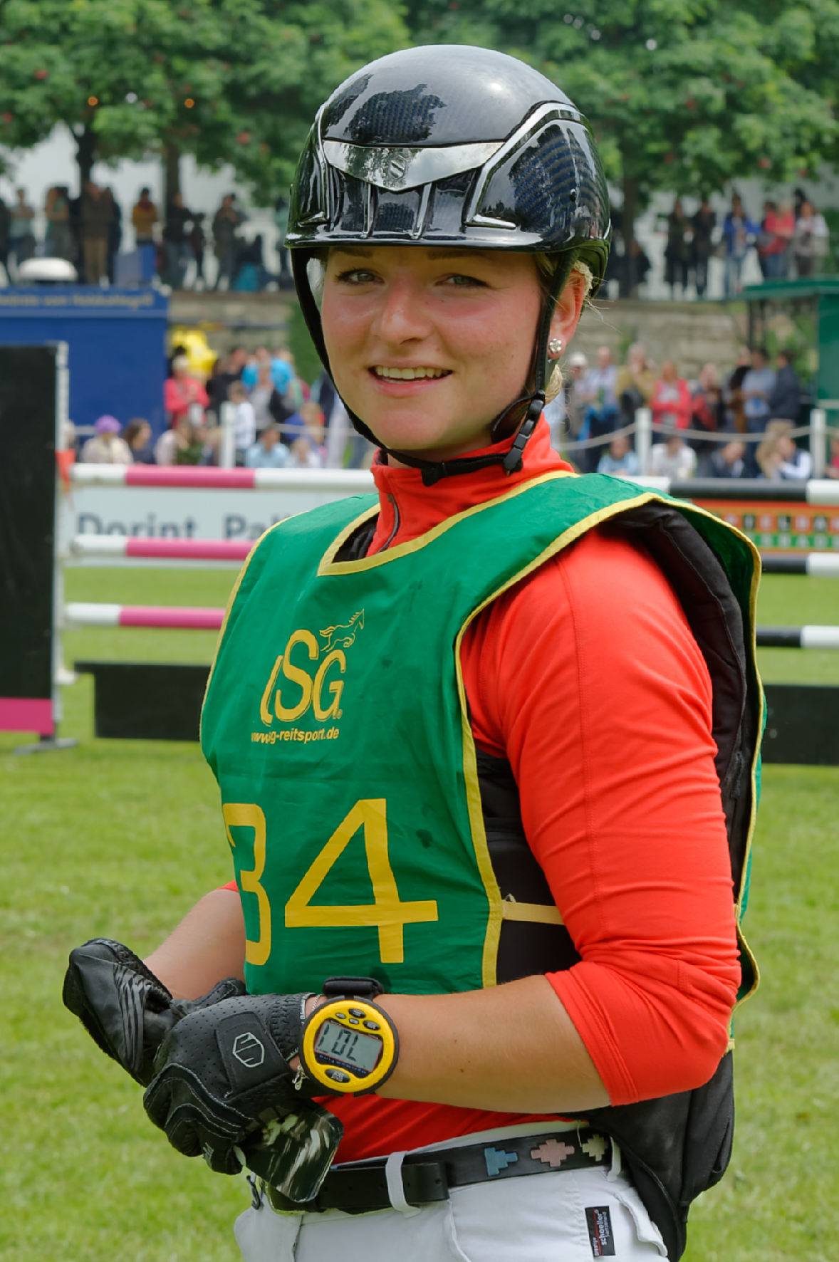 Wiesbaden, Julia Krajewski nach Vielseitigkeitssieg